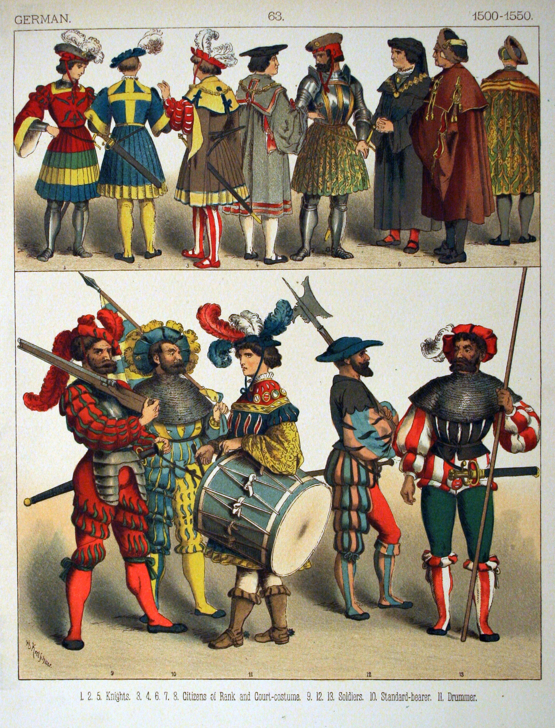 1500-1550, German